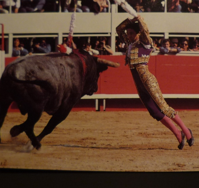 Banderilles2.JPG Richard Milian